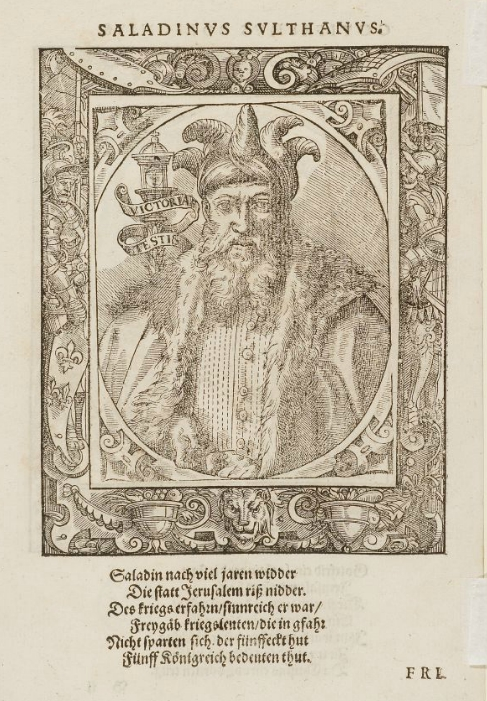 Holzschnitt von Tobias Stimmer aus Elogia Virorum bellica virtute illustrium, Dt. Ausg., Separatausgabe der Portraits 1577, Eigentliche und gedenkwürdige Contrafacturen [...] weitberümpter Kriegshelden auß Pauli IOVII Elogiis oder Rhumschriften gezogen [...]